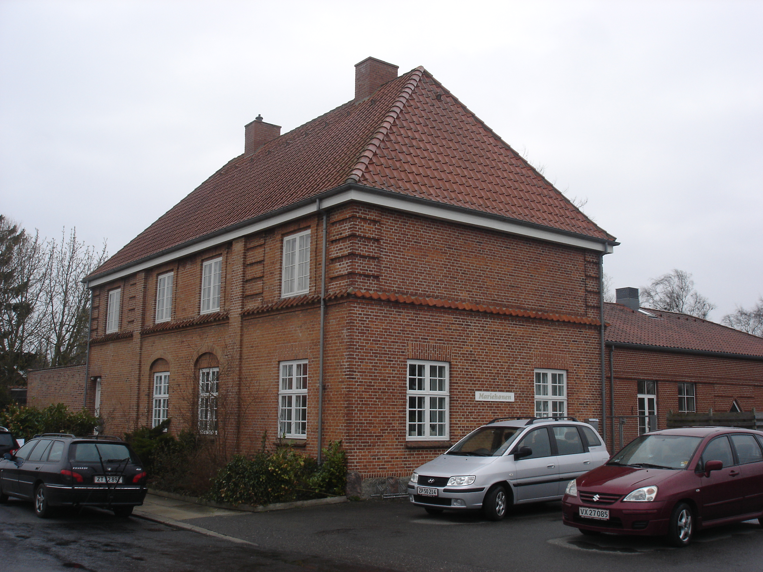 Vester Skerninge Station, vejsiden fra V